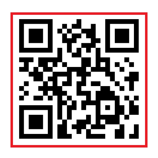 Labu Sayong